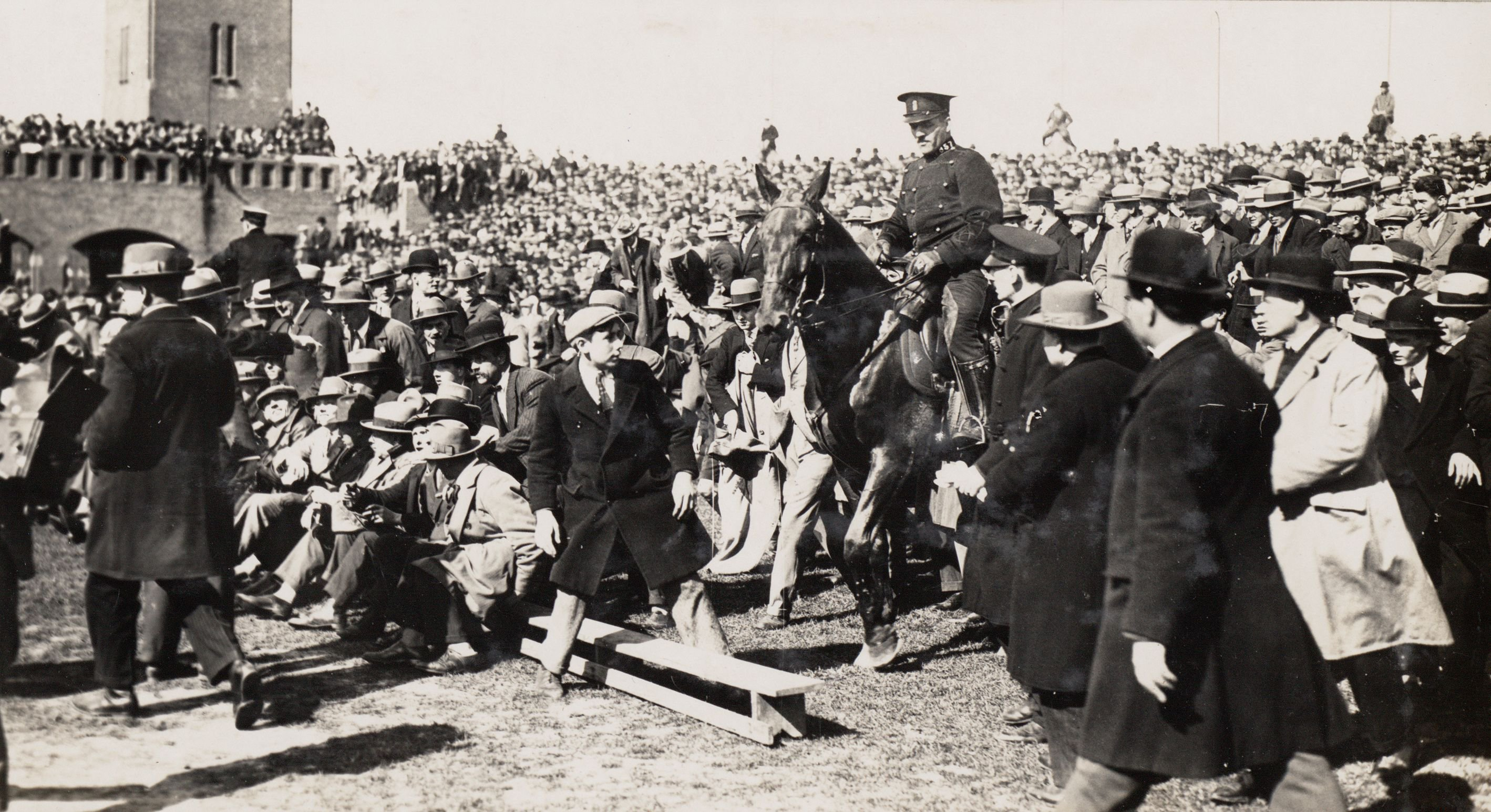 Publiek dat vanwege de grote drukte op het speelveld terechtgekomen is wordt door de bereden politie teruggedrongen. Nederland - België (3-2), gespeeld op 1 mei 1927 in het Stadion te Amsterdam.